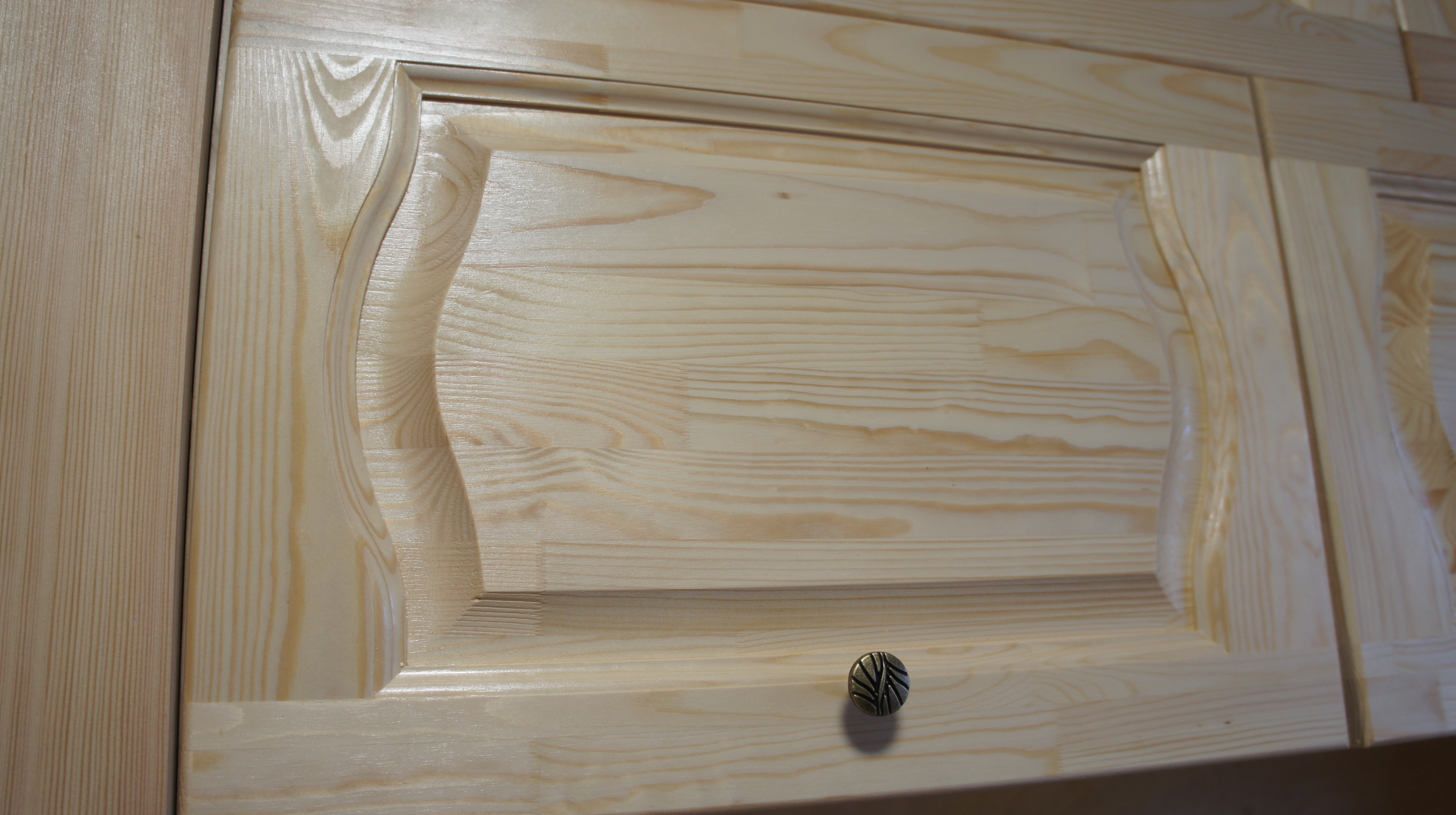 Лакированная филенчатая дверца из мебельного щита